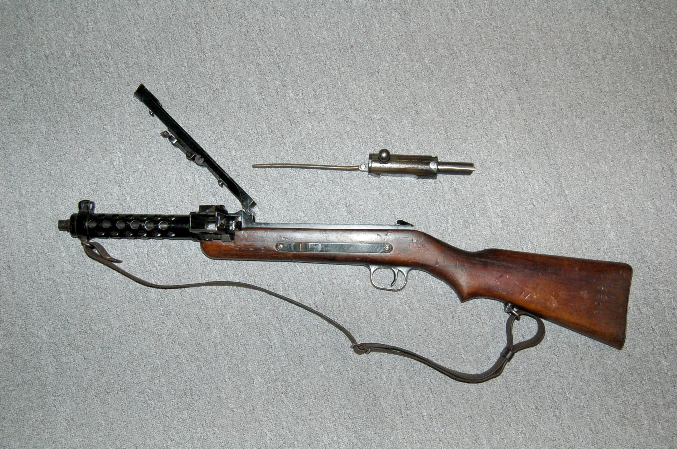 MP 34 mit geöffnetem Gehäusedeckel.